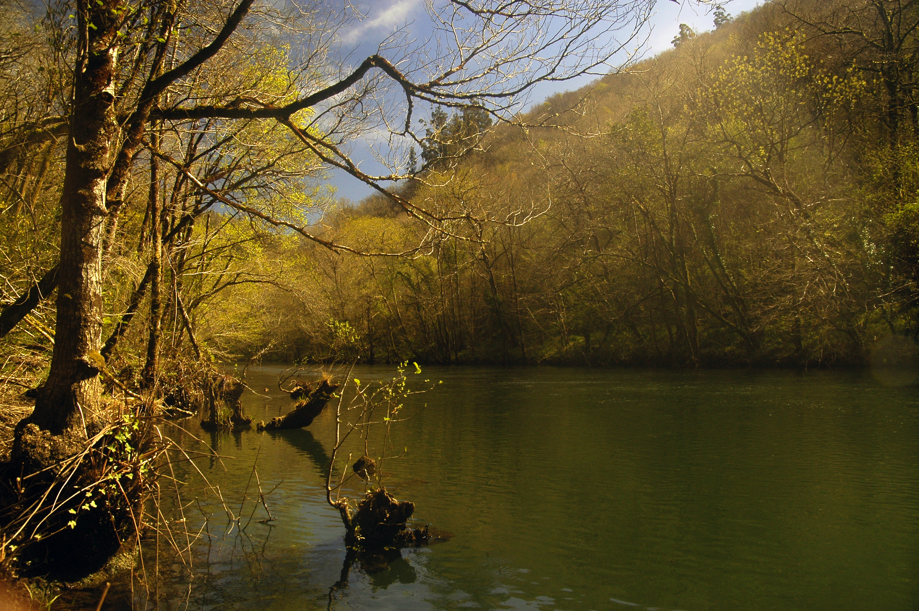 Una placentera visión del río Eume desde las Fragas del Eume, parque natural situado en Galicia This is a photography of a Special Area of Conservation in Spain with the ID: ES1110003. Natura2000 entry, EEA entry